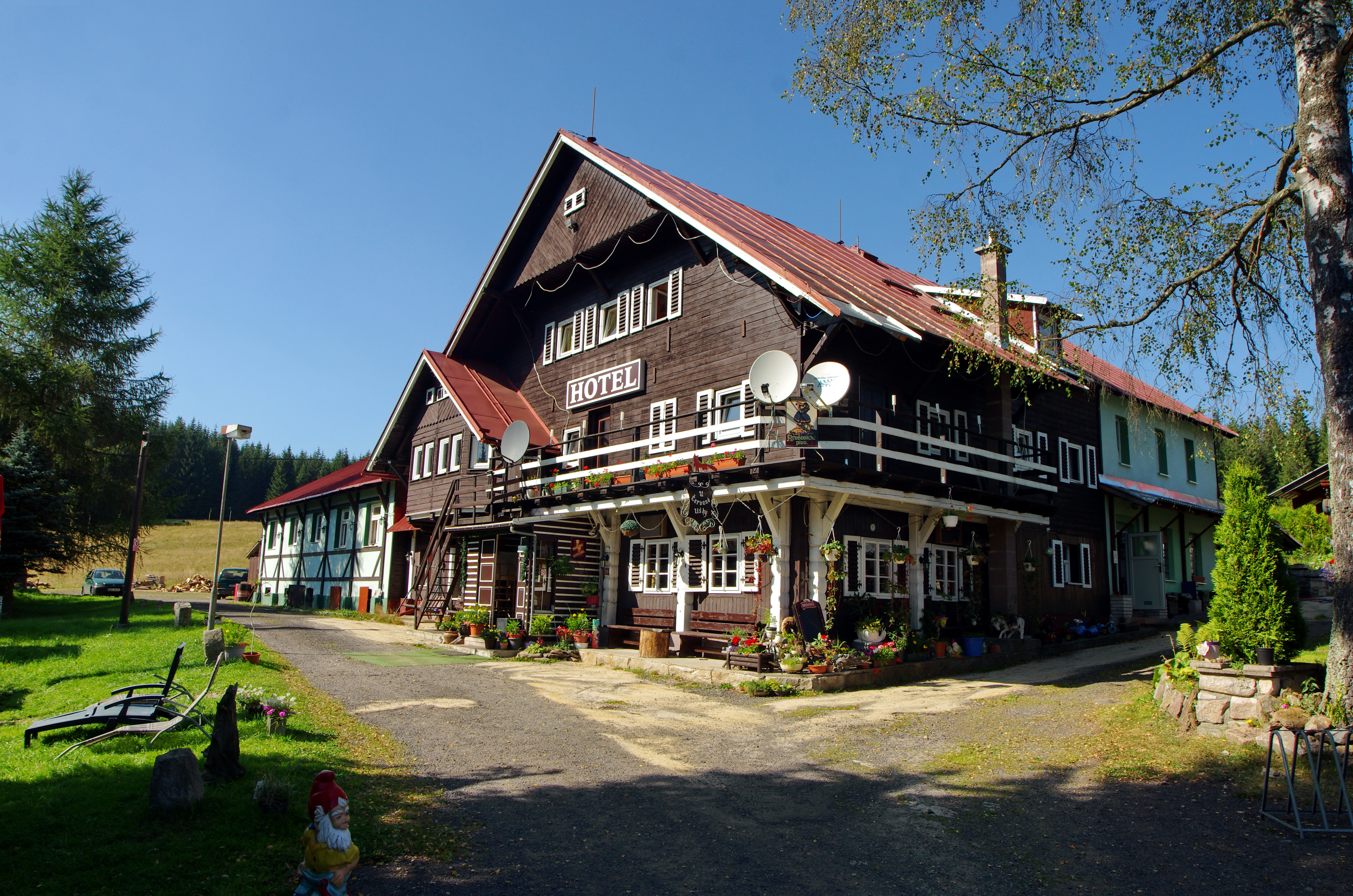 Podlesí, osada obce Potůčky v Krušných horách, hotel U červené lišky, okres Karlovy Vary